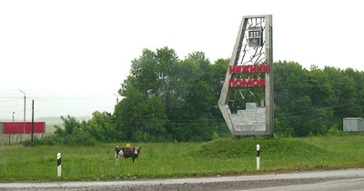 Стела на въезде в Нижний Ломов